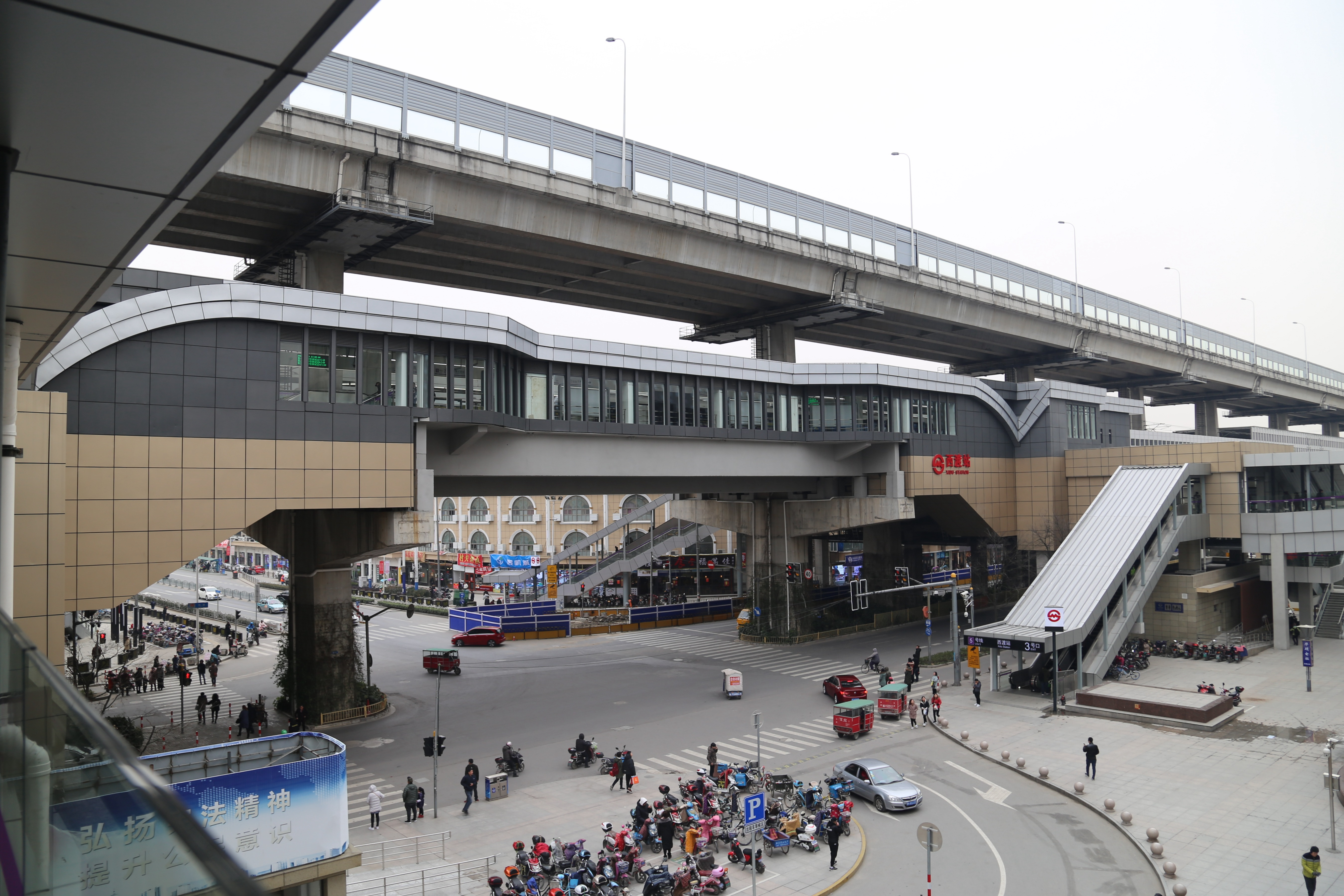 西渡站站房